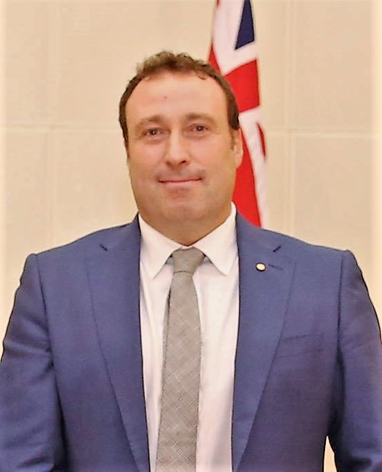 Peter Llewelyn Roberts, australischer Botschafter in Osttimor